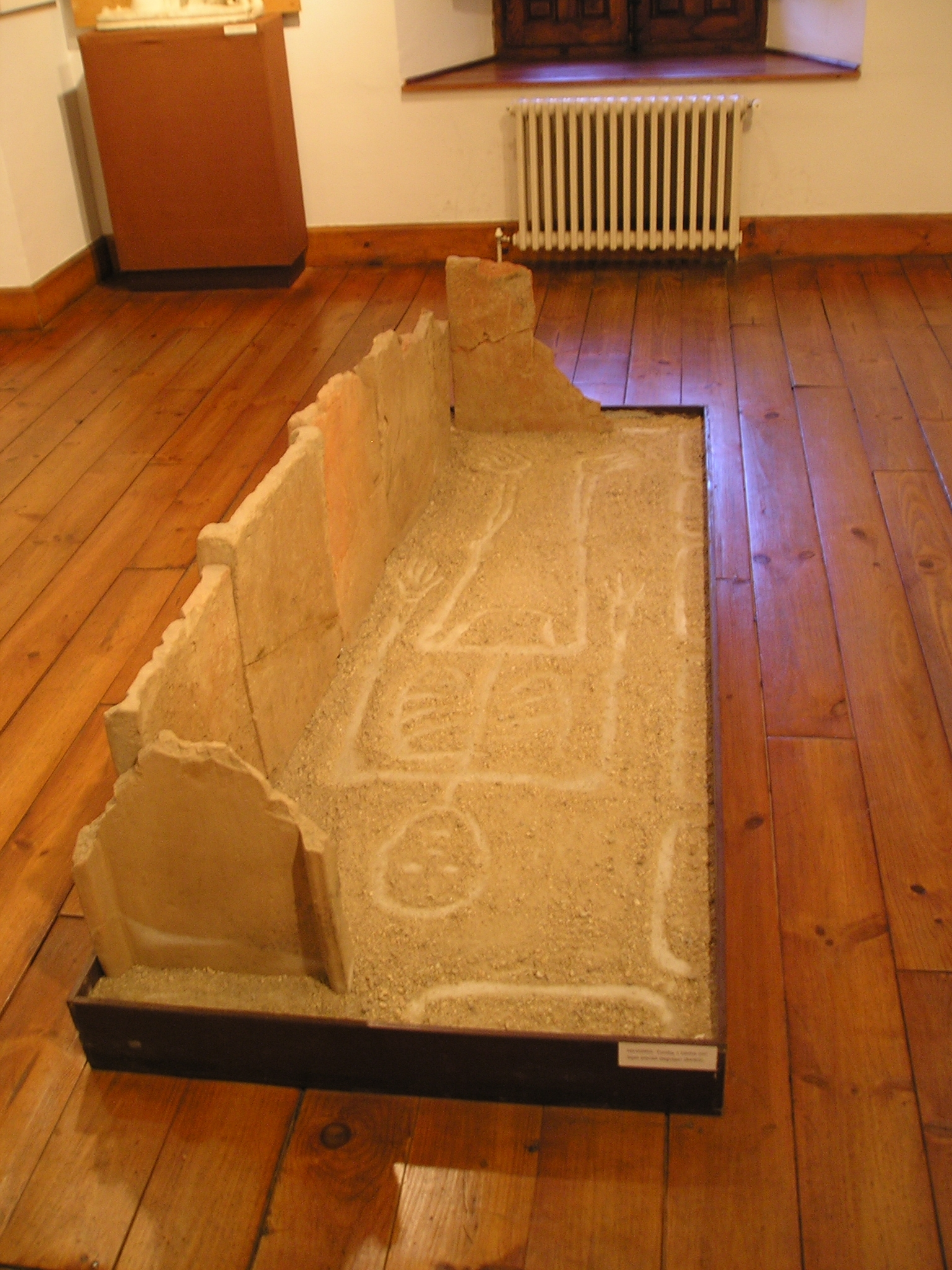 Tumba de tégulas tardorromana de Niharra